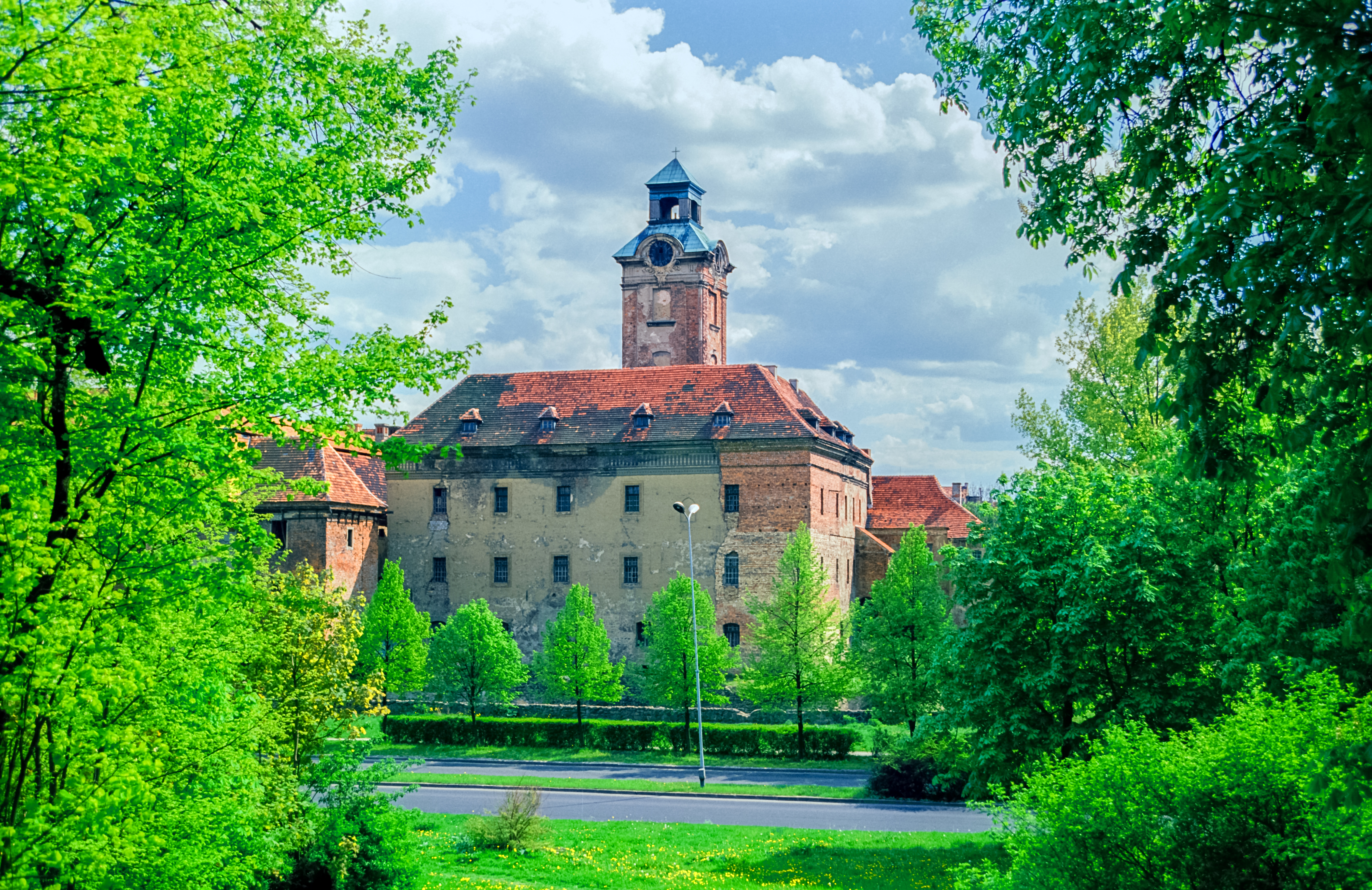 Żary, zamek Bibersteinów